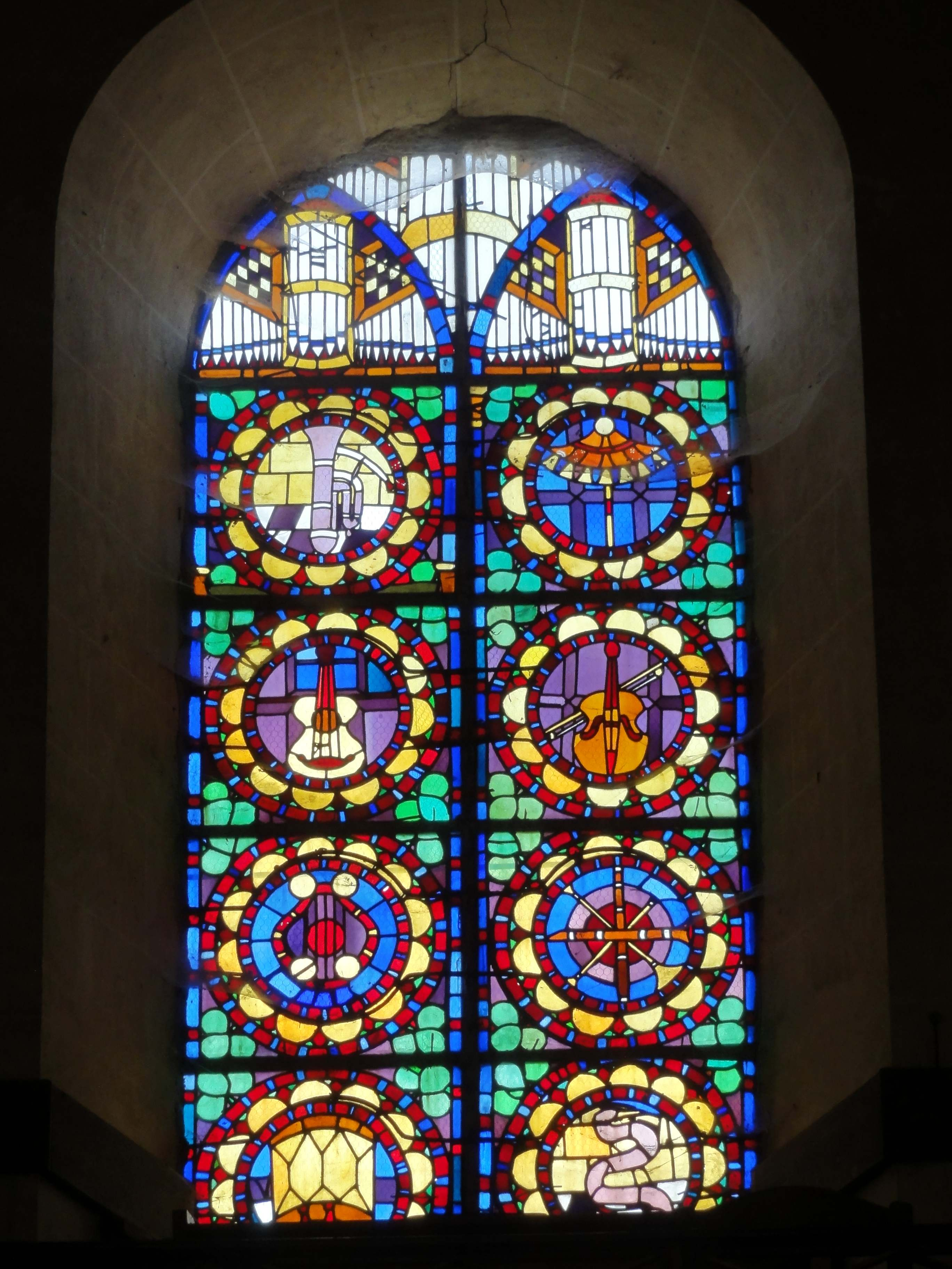 Verrière occidentale de la nef), instruments de musique utilisés à l'église, réalisée par l'abbé Théodore-Cyrille Deligny (Francières 1808 - Compiègne 1887), curé de Jonquières de 1834 à 1861. Représentation, tympan : orgue. Lancettes, du haut vers le bas et de gauche à droite : trombone, chapeau chinois, guitare, violon, lyre, trompettes, tambour (à l'envers), serpent (ophicléide).